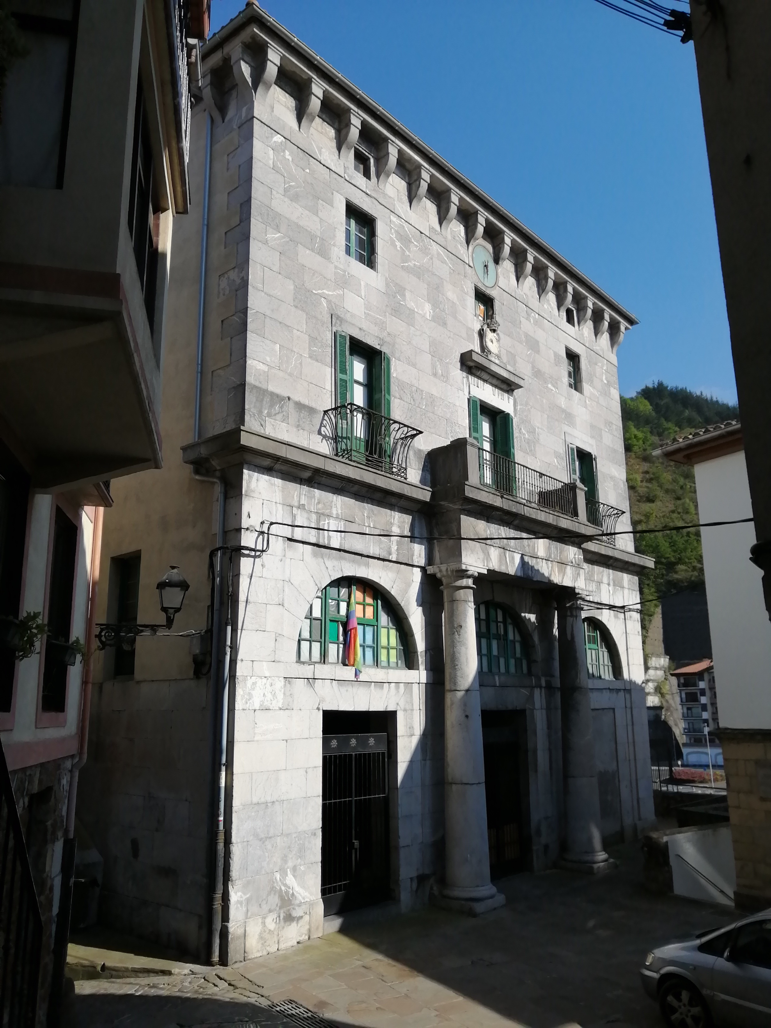 Ondarroako udaletxe zaharra, XIX. mendekoa